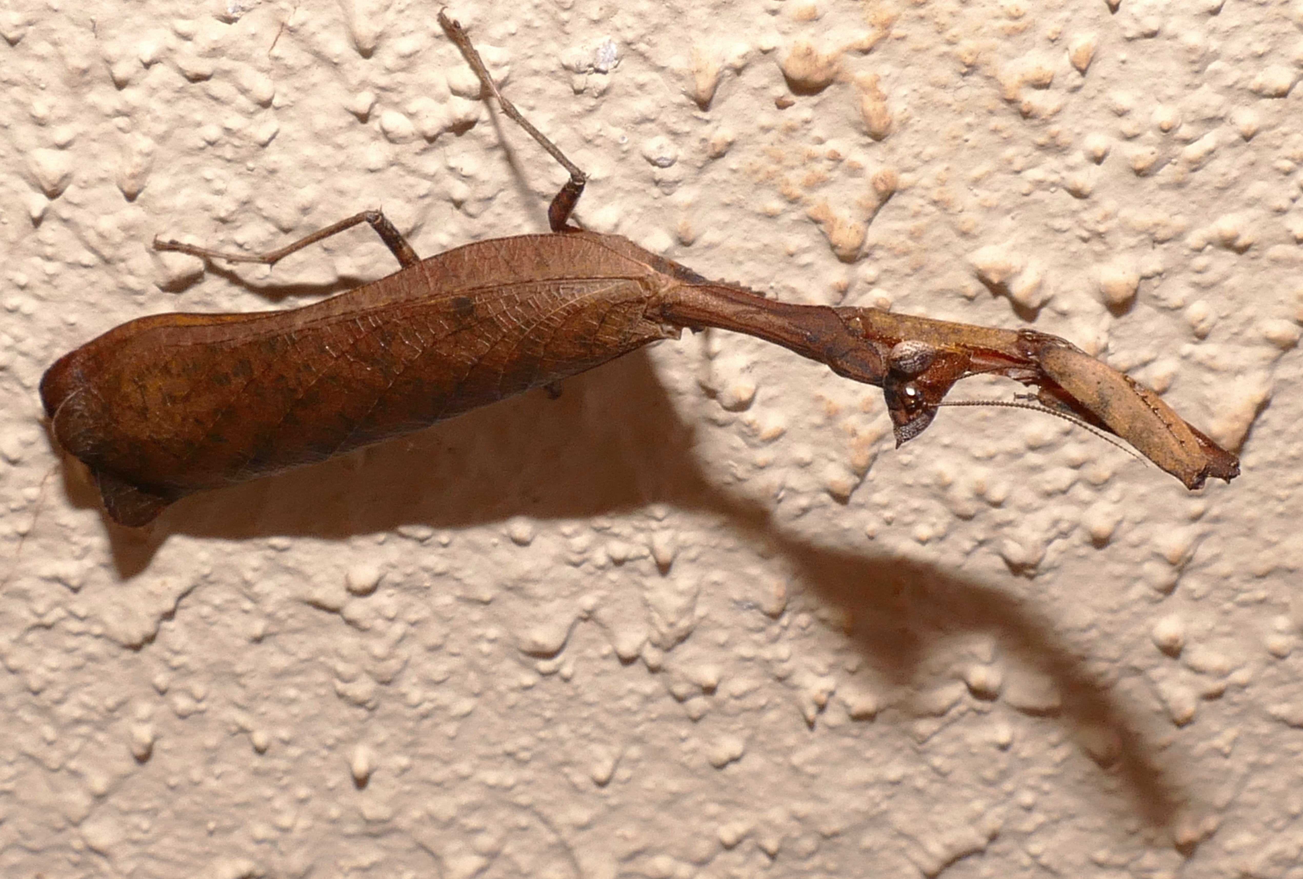 Canoas Hotel, Transpantaneira, Poconé, Mato Grosso, BRAZIL